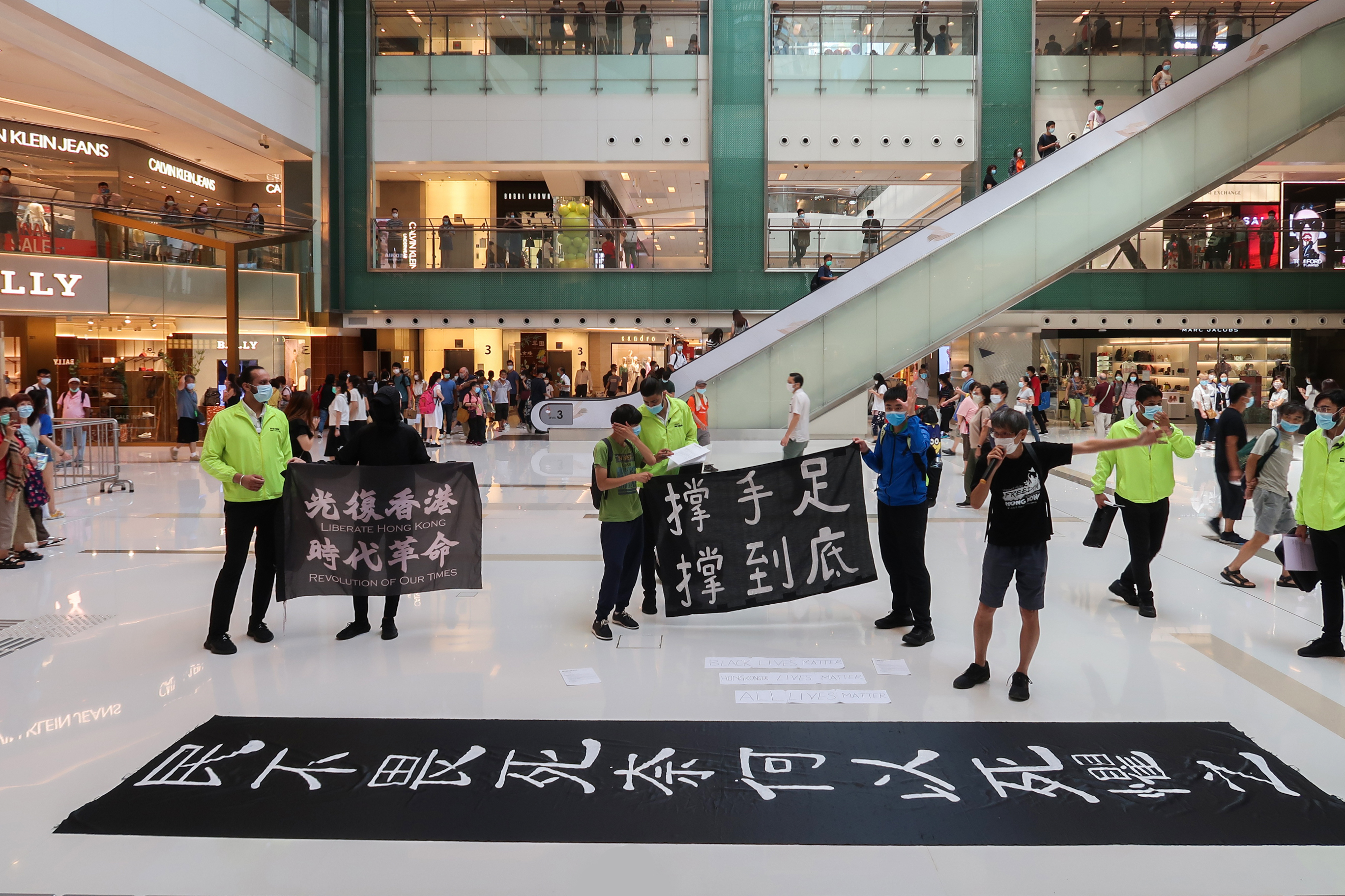 沙田和你lunch